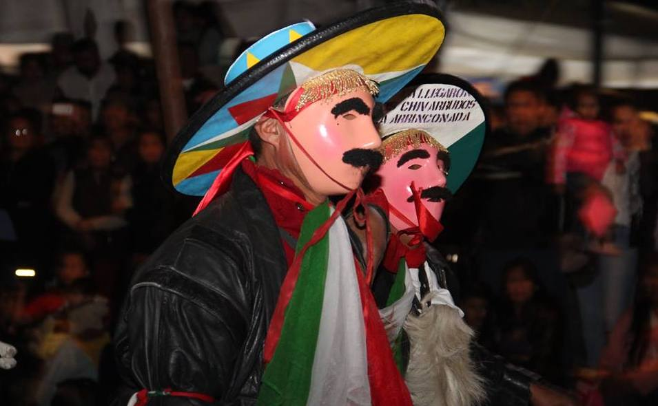 Chivarrudos del carnaval de Zacatelco